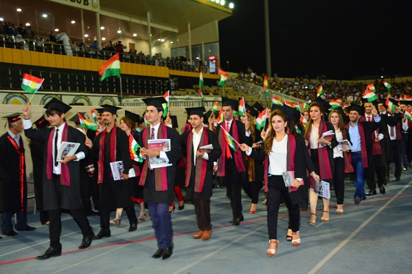 Kurdî: دەرچوان